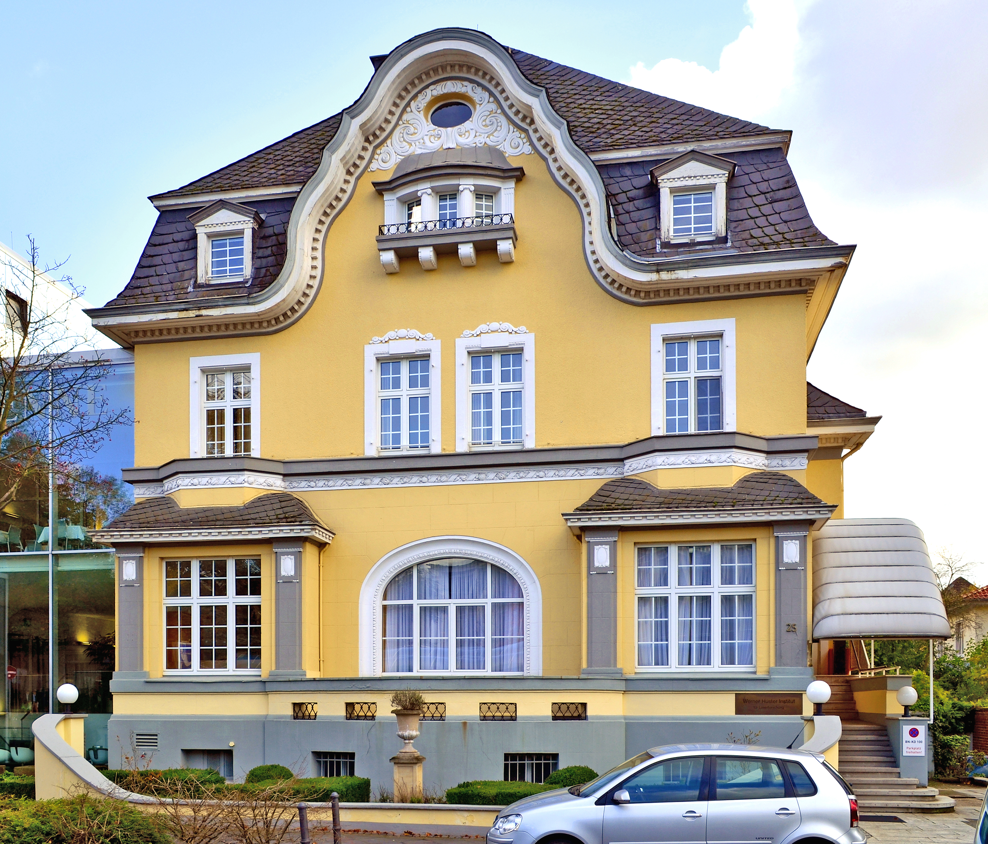 Denkmalgeschützte Villa Friedrich-Ebert-Straße 25 in Bad Godesberg, Ortsteil Alt-Godesberg